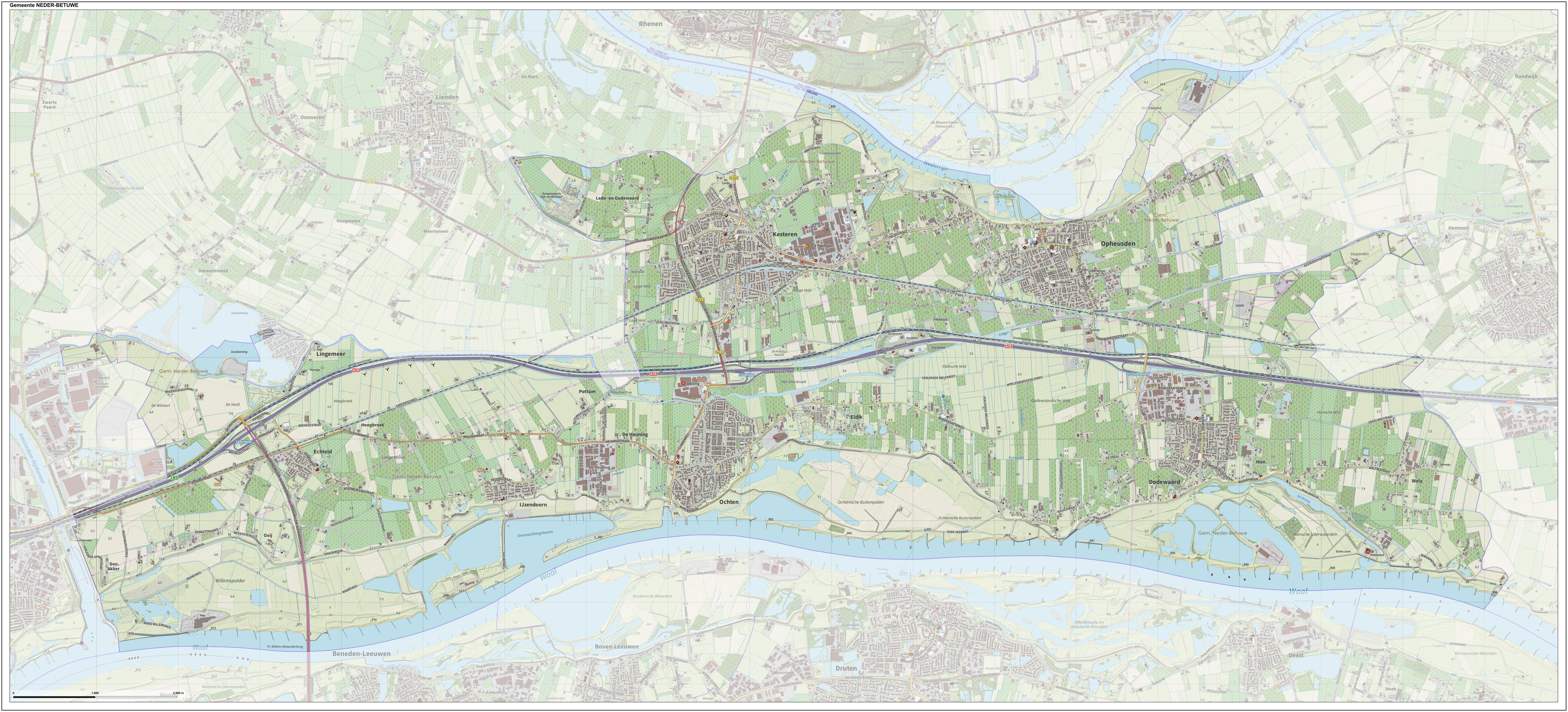 Topografische gemeentekaart. Resolutie: 400 pixels/km. Kaartbeeld samengesteld uit de open geodata van de Top10NL en Top25namen (Kadaster), Creative Commons-BY licentie. Gebouwvlakken uit open geodata BAG extract. Wegen uit de OpenStreetMap, OpenStreetMap community. Reliëfschaduw uit de Actuele Hoogtekaart AHN2. Samenstelling en kleurenschema: Jan-Willem van Aalst, met QGIS. Zie ook de Legenda.